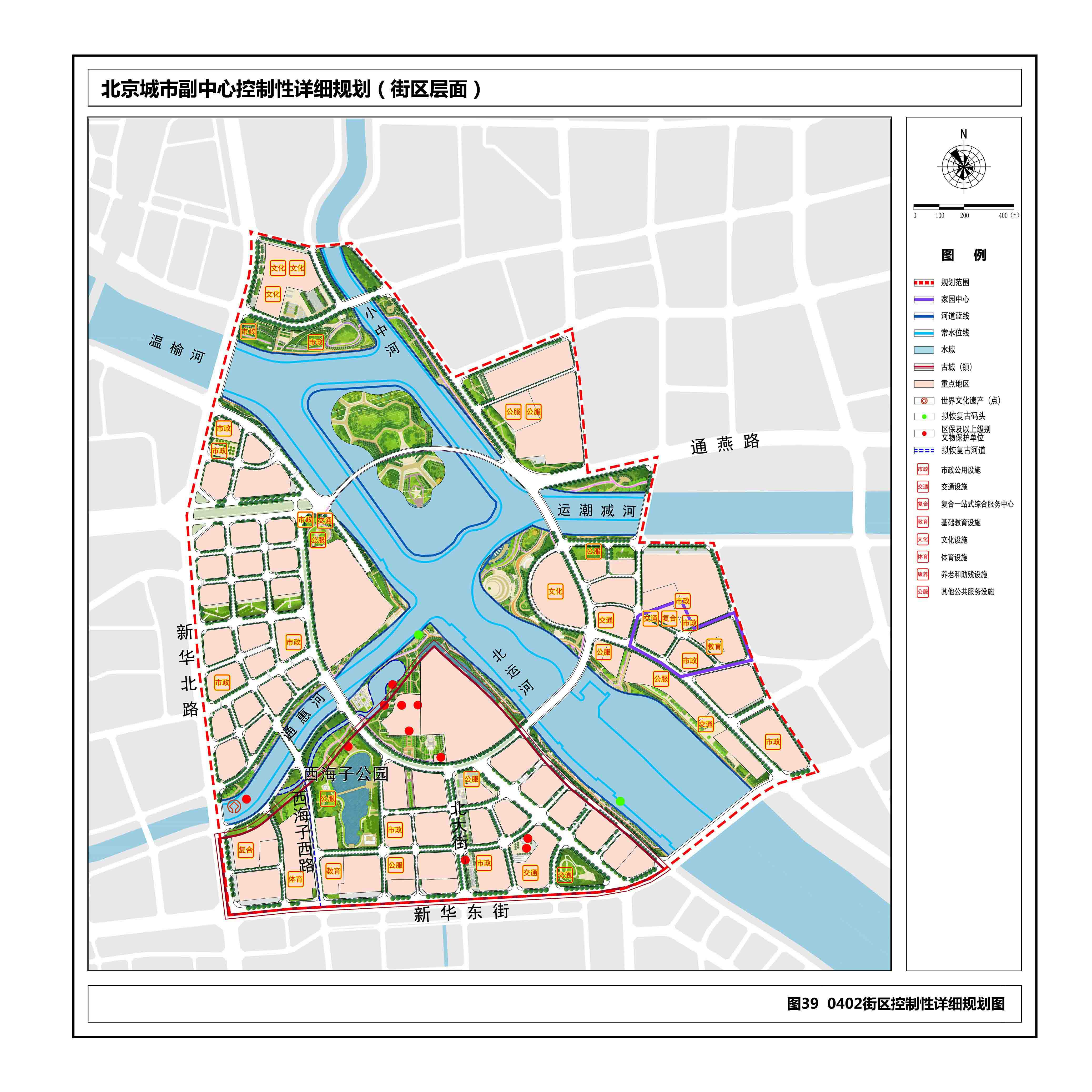 中文（中国大陆）: 北京城市副中心控制性详细规划（街区层面）（2016年-2035年）